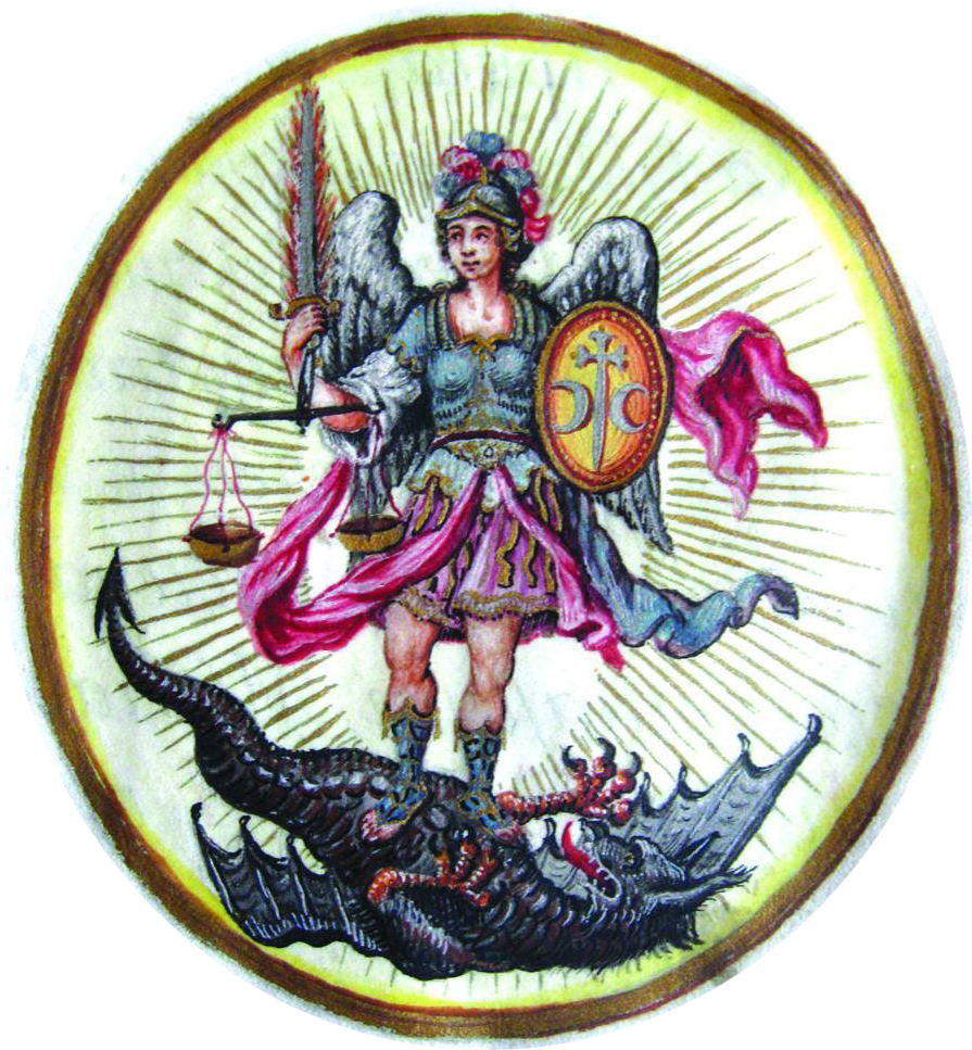 Беларуская (тарашкевіца): Сіроцін (Sirocin). Герб